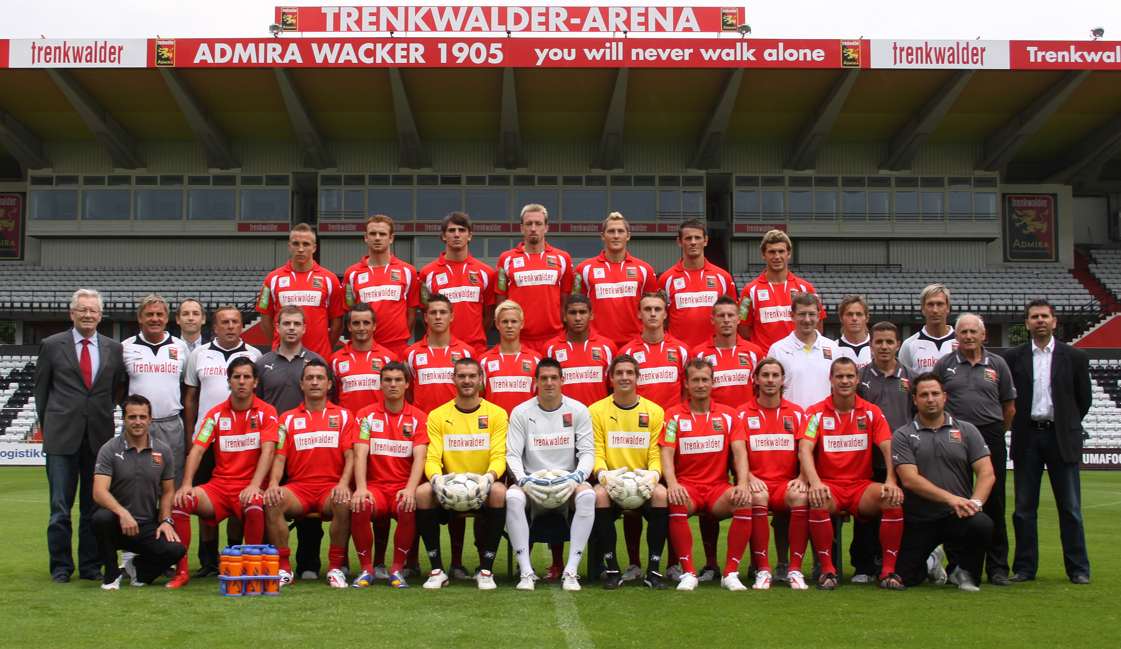 FC Admira Wacker Mödling (jeweils von links nach rechts): Erste Reihe: Georg Wilfinger (Physiotherapeut), Sandro Zakany, Almedin Hota, Christoph Mattes, Simon Manzoni, Thomas Mandl, Patrick Tischler, Vladimir Janocko, Christoph Cemernjak, Ernst Dospel, René Riesner (Masseur); Zweite Reihe: Richard Trenkwalder (Präsident), Walter Schachner (Trainer), Alexander Friedl (Geschäftsführer), Gottfried Jantschgi (Co-Trainer), Dr. Marcus Hofbauer (Teamarzt), Rene Schicker, Rene Seebacher, Daniel Toth, Ken Noel, Martin Pusic, Gernot Plassnegger, Nils Trenkwalder (Finanzvorstand), Anton Beretzki (Konditionstrainer), Viorel Bondor (Zeugwart), Georg Heu (Tormanntrainer), Anton Bernhold (Masseur), Armin Schiller (Teammanager); Dritte Reihe: Christopher Dibon , Michael Horvath, Mihret Topčagić, Günter Friesenbichler, Markus Hanikel, Sascha Laschet, Andreas Schicker; Fehlend: Froylán Ledezma, Thomas Hopfer, Muhammet Akagündüz, Heribert Weber (Sportdirektor)